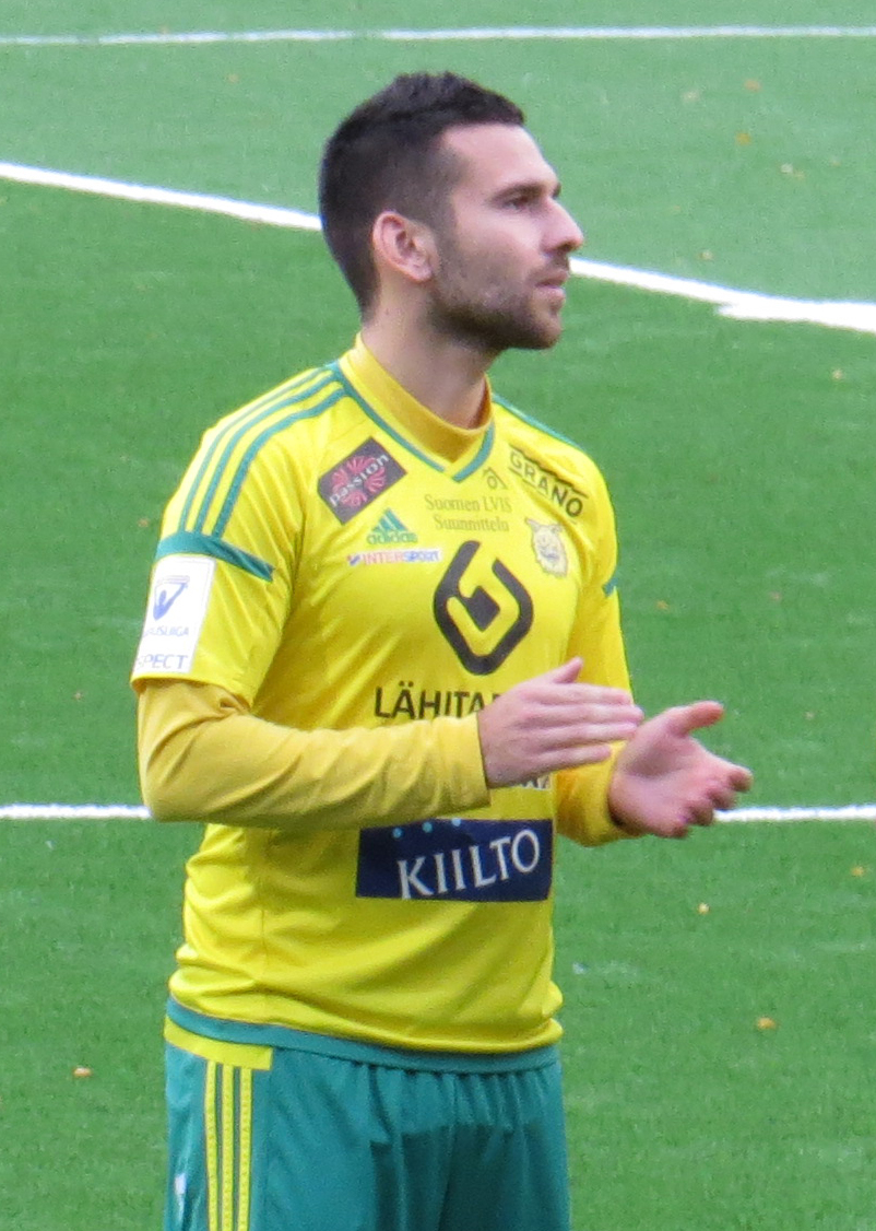 Tomi Petrescu, suomalainen jalkapalloilija Tampereen Ilveksen joukkueessa kaudella 2015.